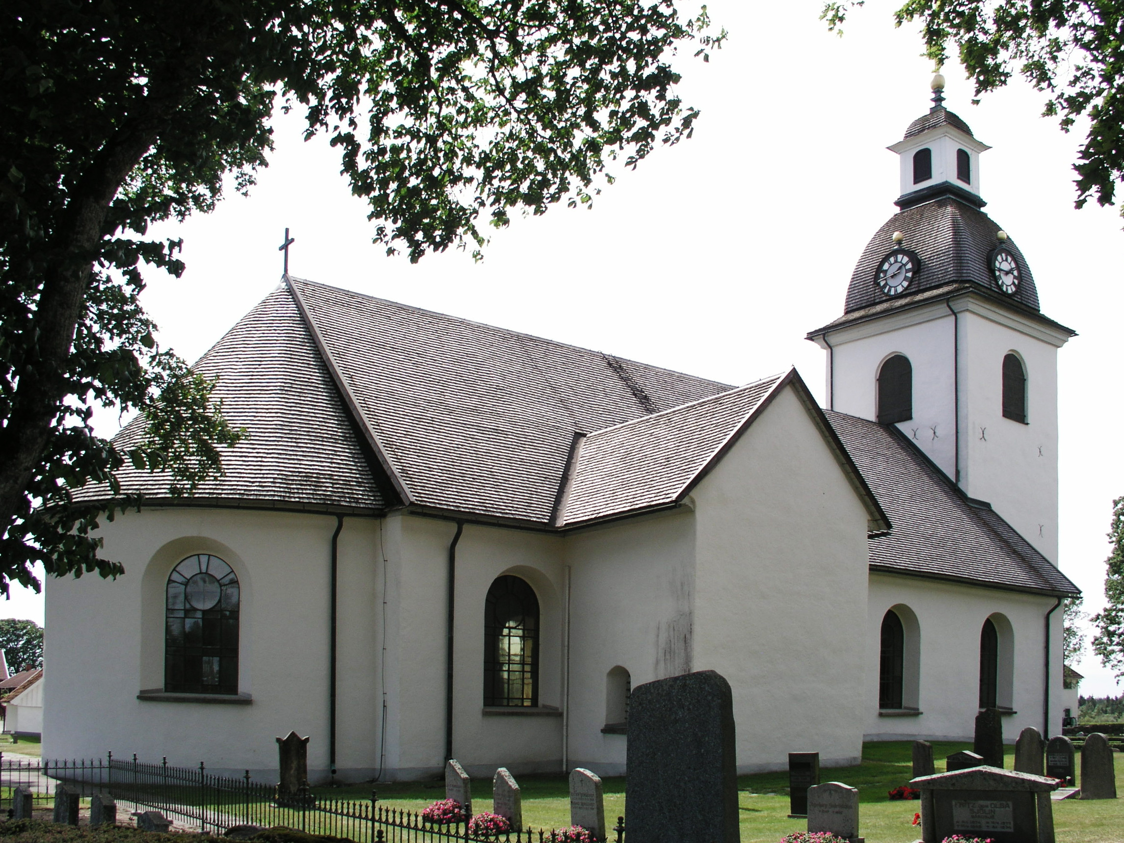 Lerbäcks kyrka, Askersund, Sweden. View.